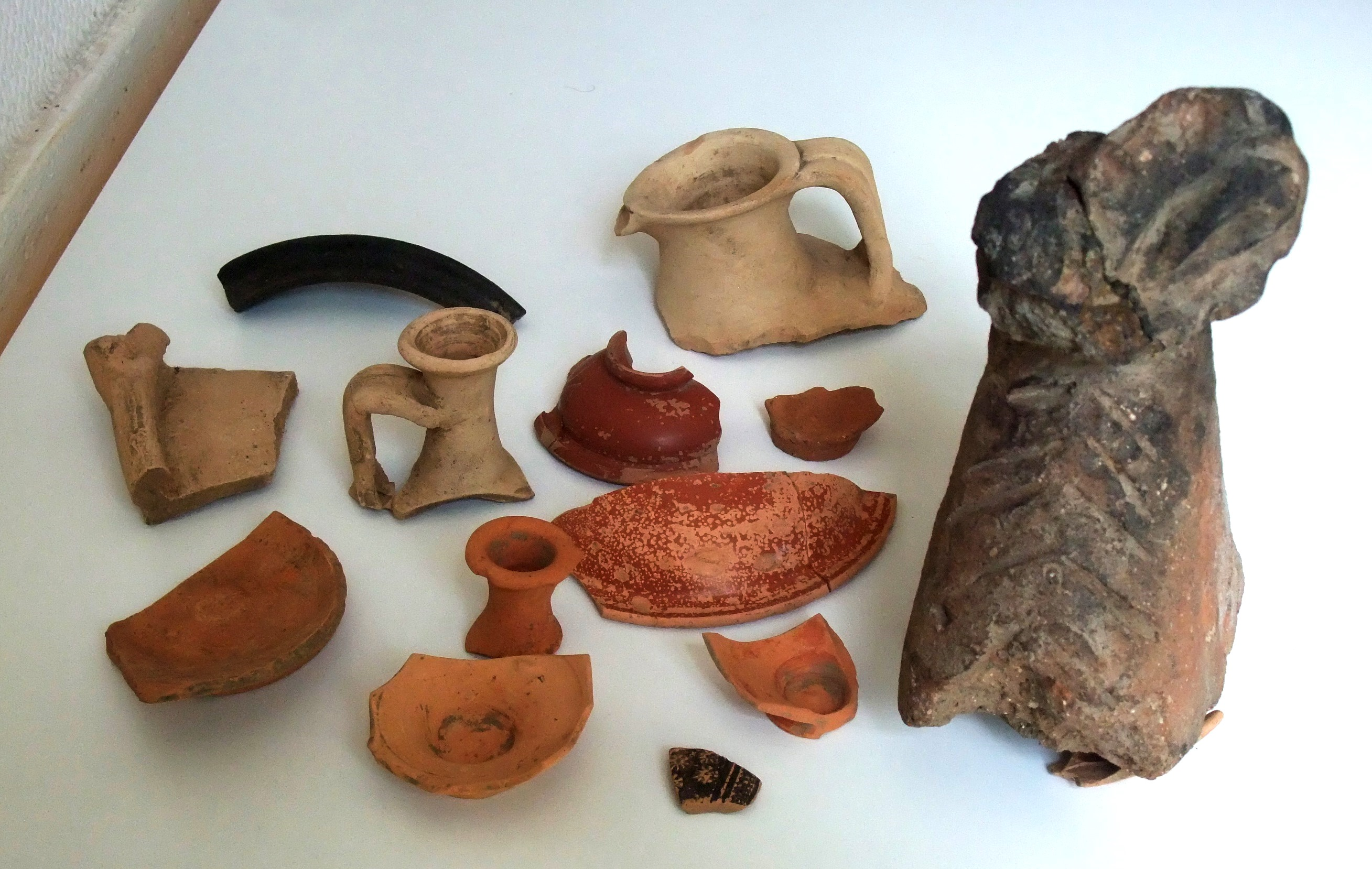 objets trouvés à St-Cyr Ardèche